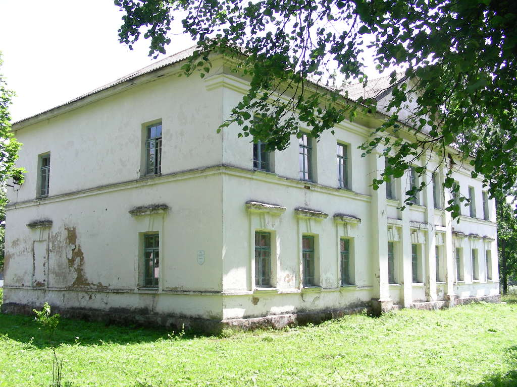 Беларуская (тарашкевіца): Комплекс былой сядзібы: сядзібны дом аднапавярховы дом з мансардай флігель-кухня жылы будынак руіны капліцы гаспадарчая пабудова склеп. в. Волма This is a photo of Belarusian heritage monument. Reference number: 612Г000135 ( WLM)